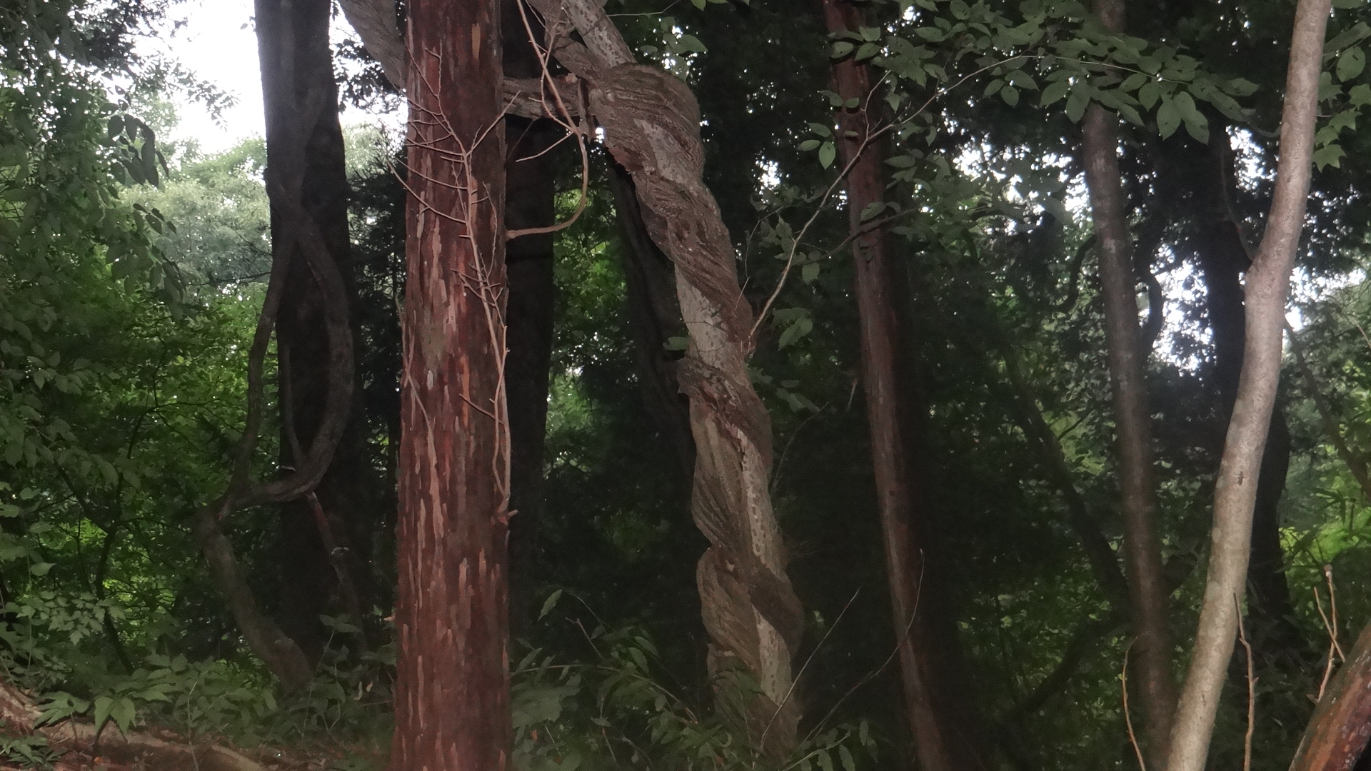 photo prise à Nikko